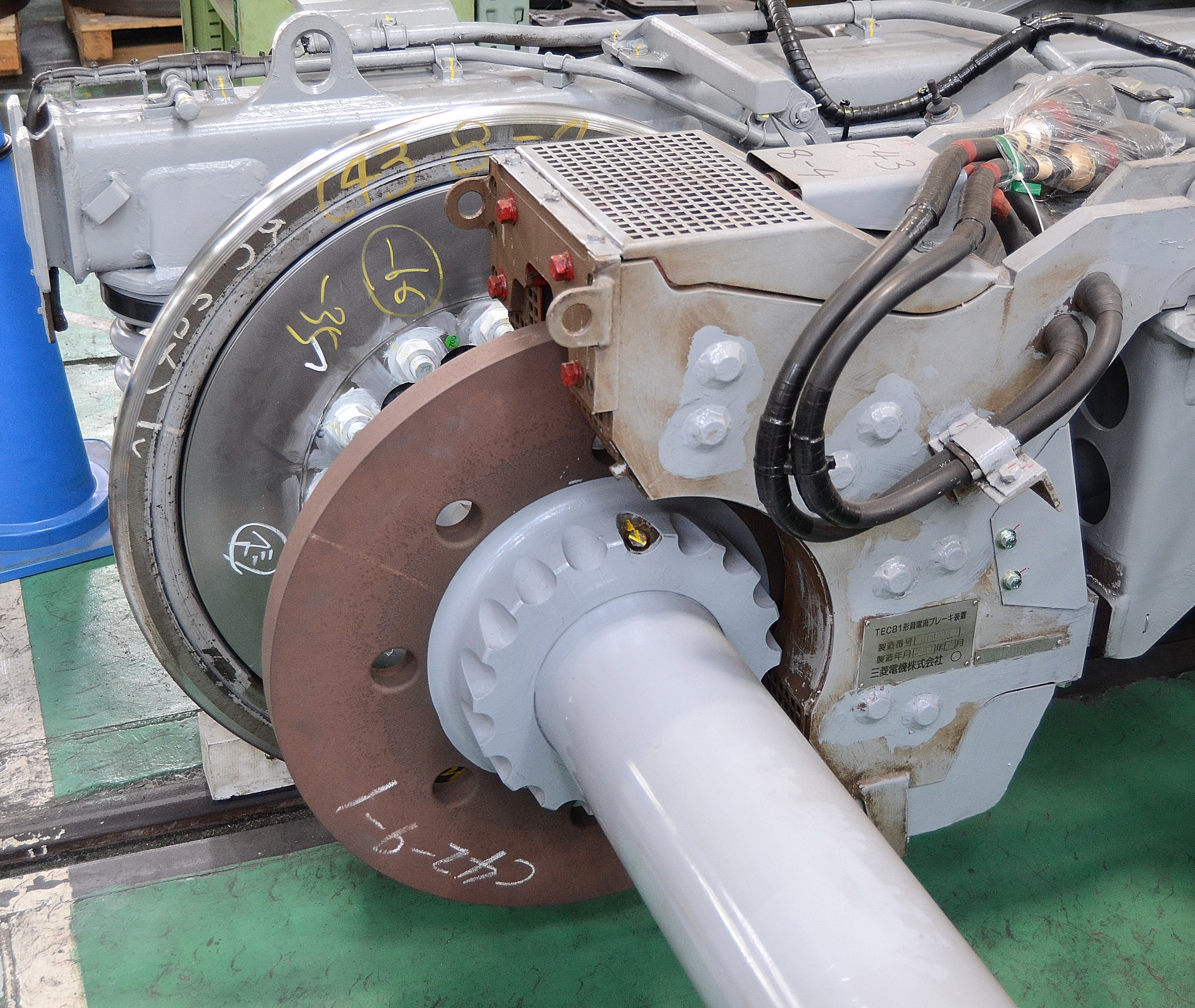 700系の付随台車の輪軸に装備されている渦電流ディスクブレーキ（2014年、浜松工場で開催された新幹線なるほど発見デーにおいて撮影）。